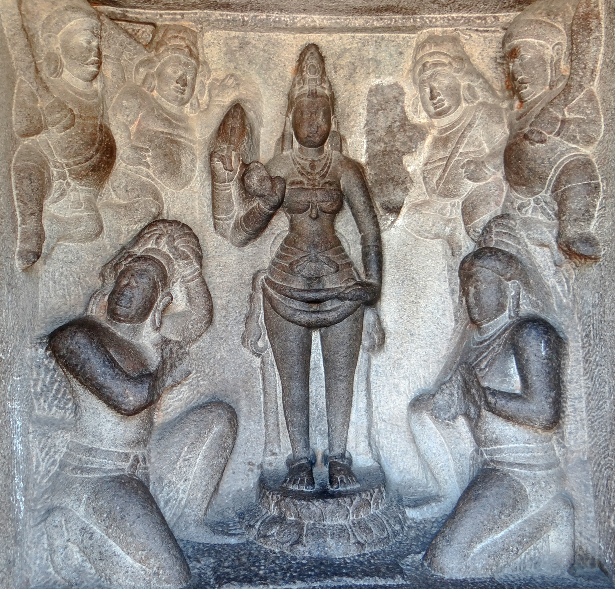 Relief représentant la déesse Durga à l'intérieur du temple Draupadi, un des cinq rathas (temples monolithes) de Mahabalipuram Ces cinq temples monolithes, appelés rathas (chariots), ont été sculptés sous le règne de Narasimhavarman (630-670), de la dynastie des Pallavas à Mahabalipuram en Inde du sud. Un ratha est un chariot en bois destiné à transporter le dieu lors d'une procession, il prend la forme d'un petit temple doté de roues, c'est par analogie que ces temples monolithes ont reçu ce nom bien qu'ils n'aient pas de roues. Ils reproduisent à l'identique dans le rocher les morphologies des temples construits à l'époque dans des matériaux non pérennes et qui ont tous disparus. Cette caractéristique en fait un site essentiel pour comprendre l'évolution de l'architecture dravidienne. Deux temples sont de forme pyramidale sur une base carrée (Arjuna et surtout le Dharmaraja), c'est cette morphologie qui a été retenue dans l'architecture dravidienne ultérieure car elle évoque le mont Meru, la demeure des dieux et répond à la cosmologie hindoue (la cella comme centre rituel rayonnant). Le site de Mahabalipuram est classé par l'UNESCO au patrimoine mondial. A l'époque des Pallavas, la ville était un port en relation avec le Champa (royaume vaincu situé au centre et au sud de l'actuel Vietnam), Bali en Indonésie, le pays khmer (Cambodge), autant de régions qui s'étaient indianisées par le biais des échanges commerciaux. Article de Wikipedia sur Mahabalipuram